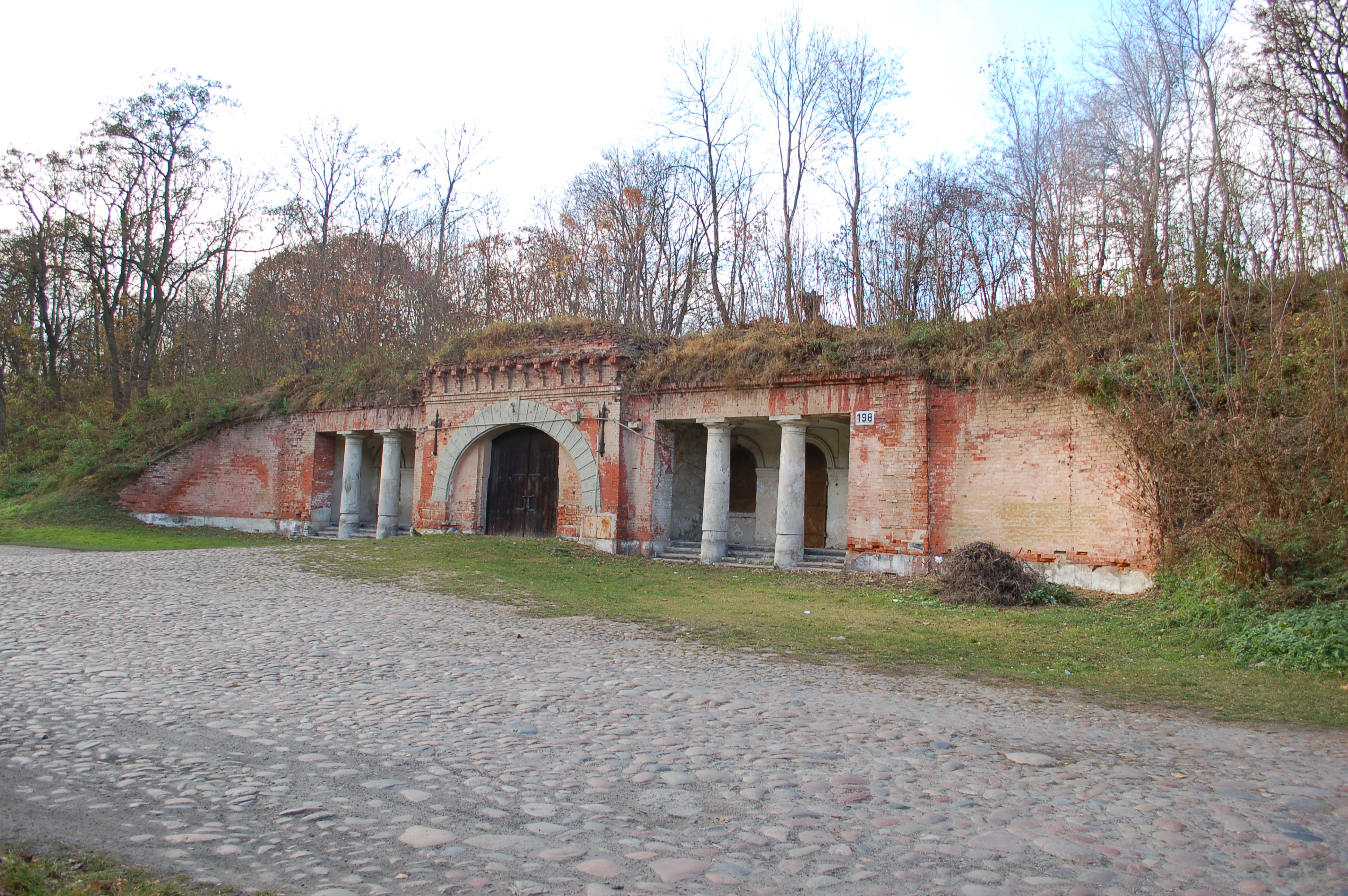 Festung Modlin